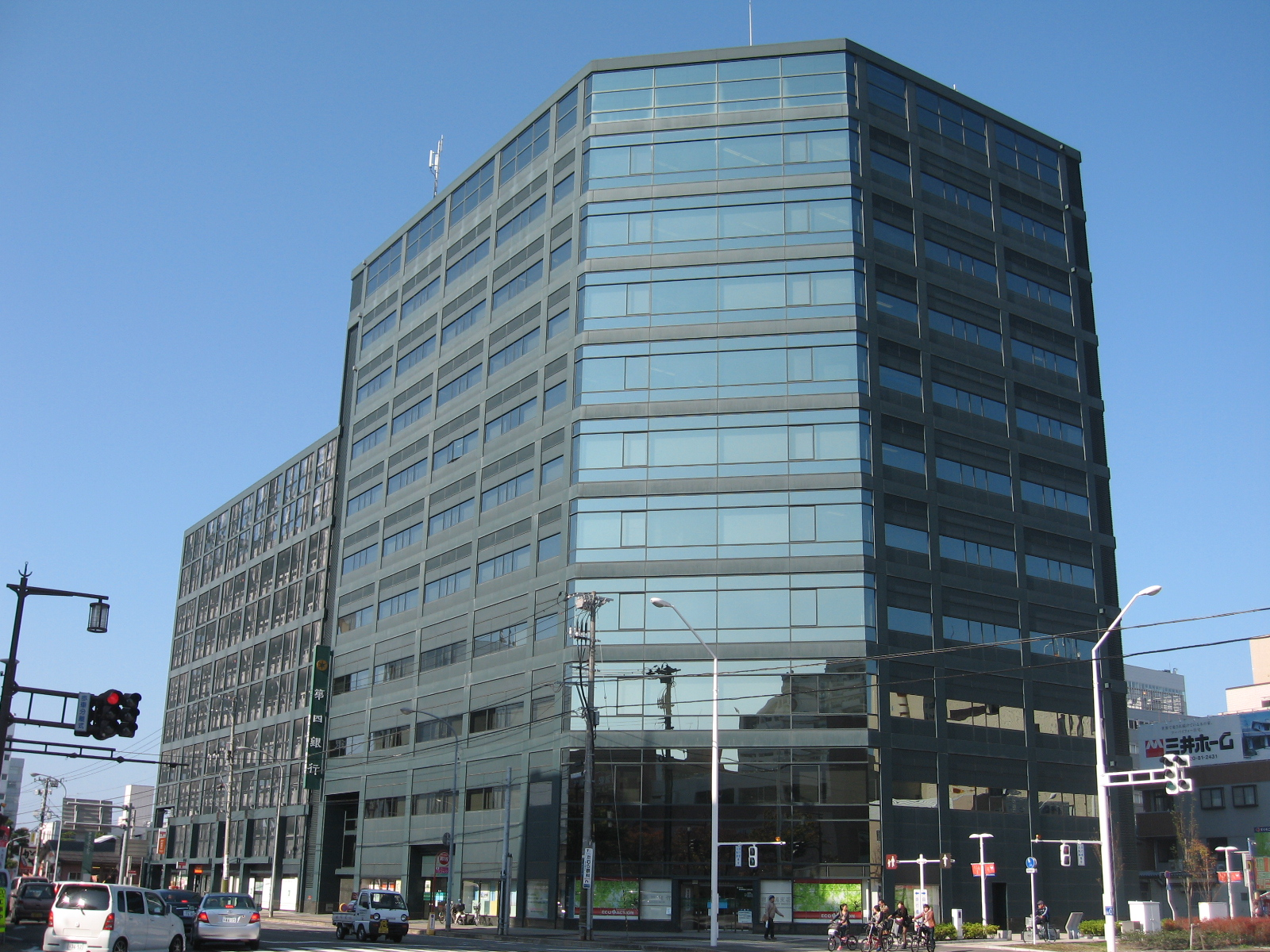 駅南センタービルの画像。